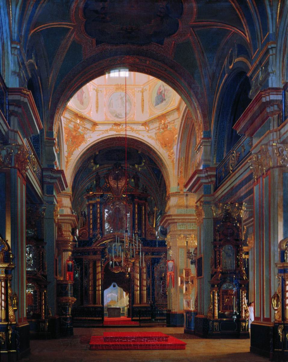 Внутренний вид морского Никольского собора в Петербурге Зарянко Сергей Константинович Внутренний вид морского Никольского собора в Петербурге 1843